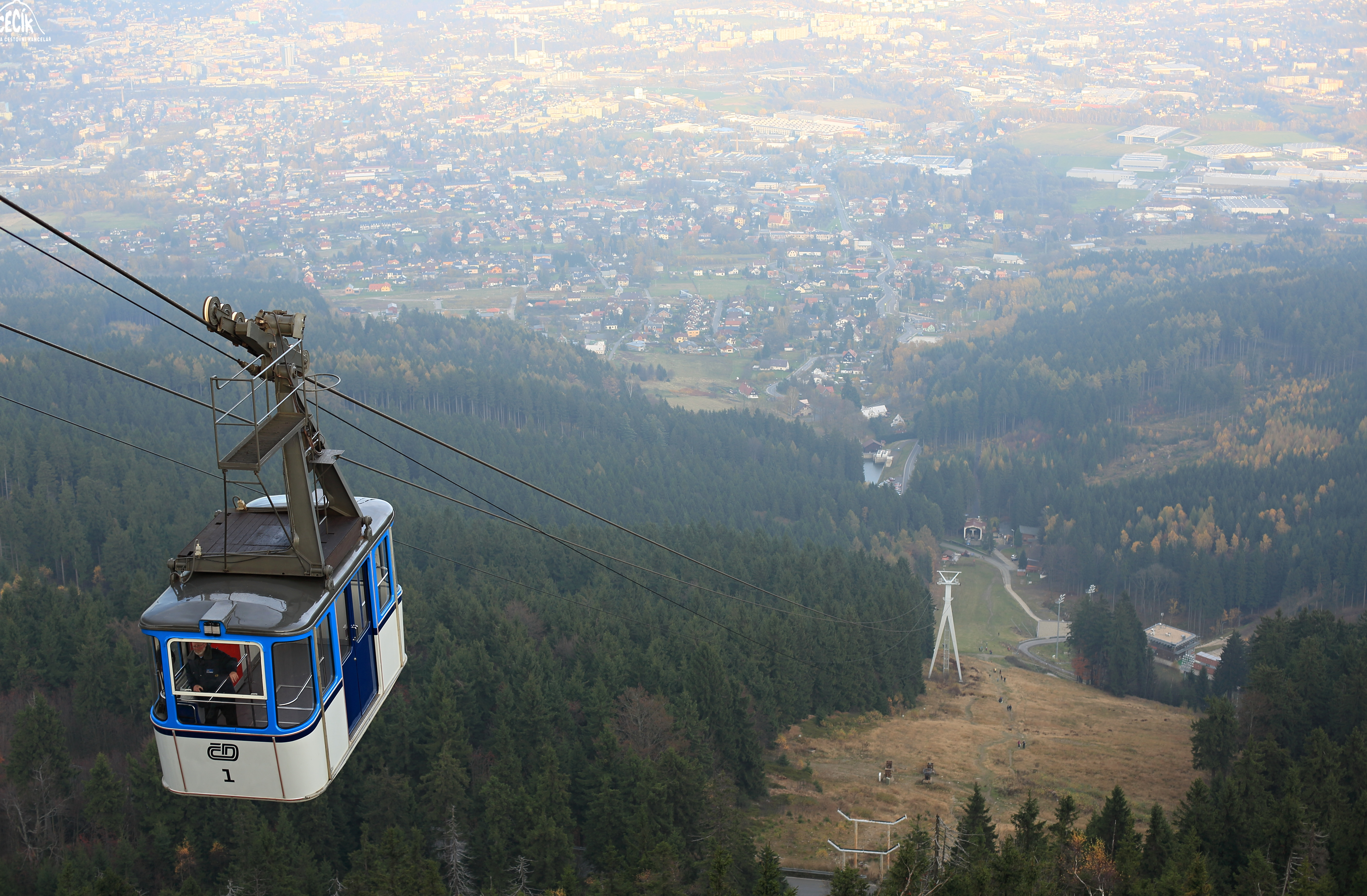 Lanovka na Ještěd - poslední, kterou v ČR provozují České dráhy